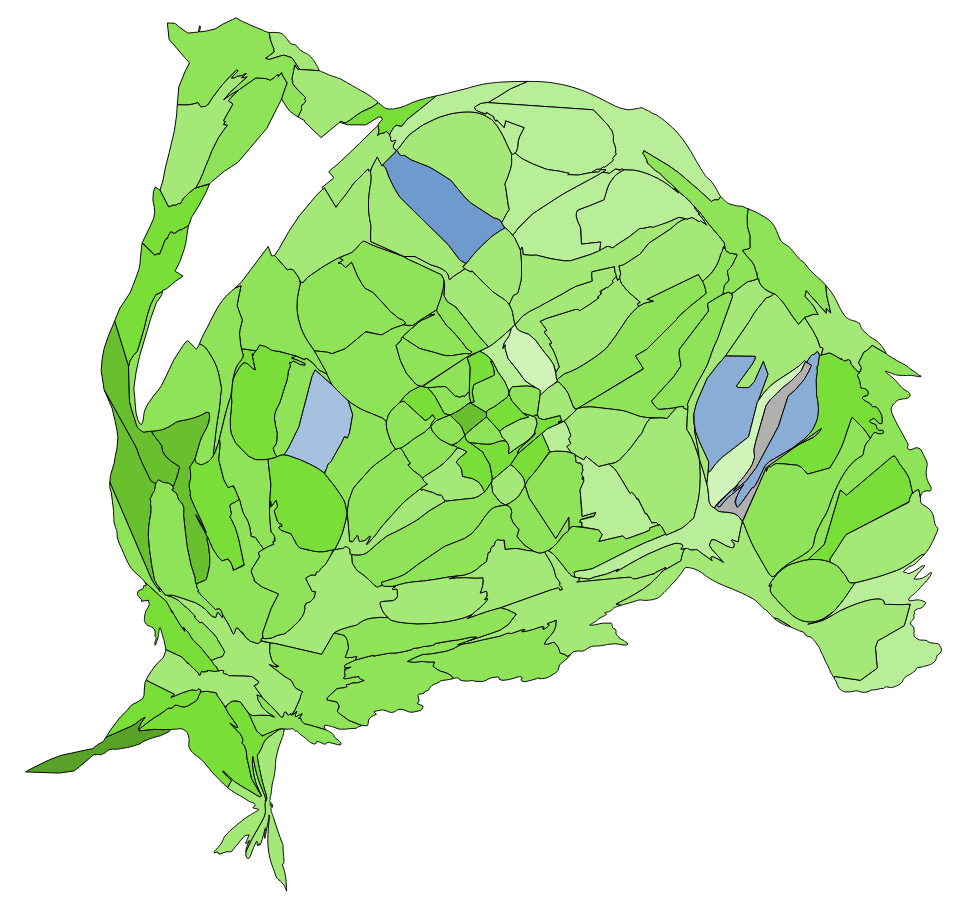 顏色對照表